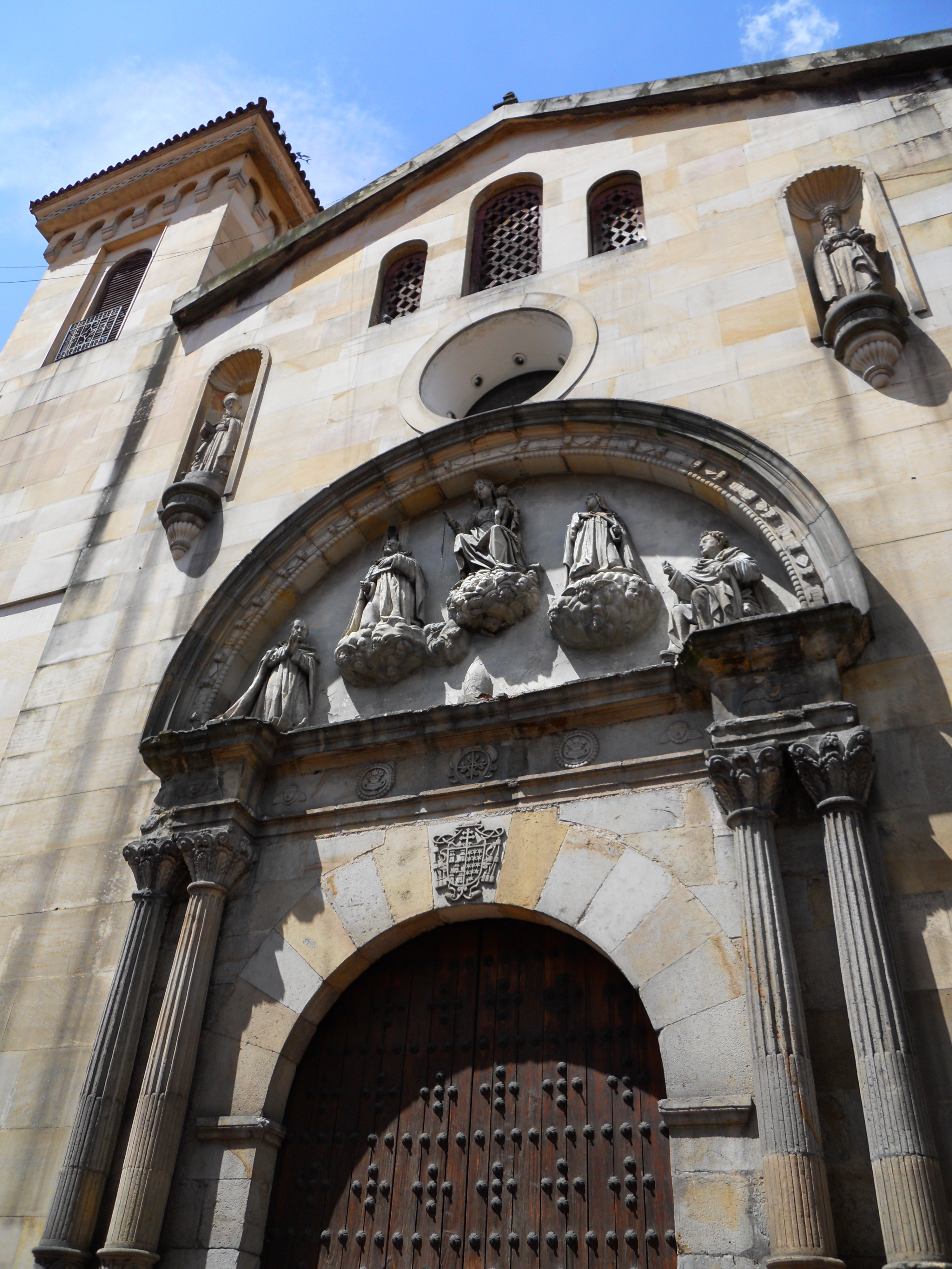 Bogotá, Iglesia La Bordadita